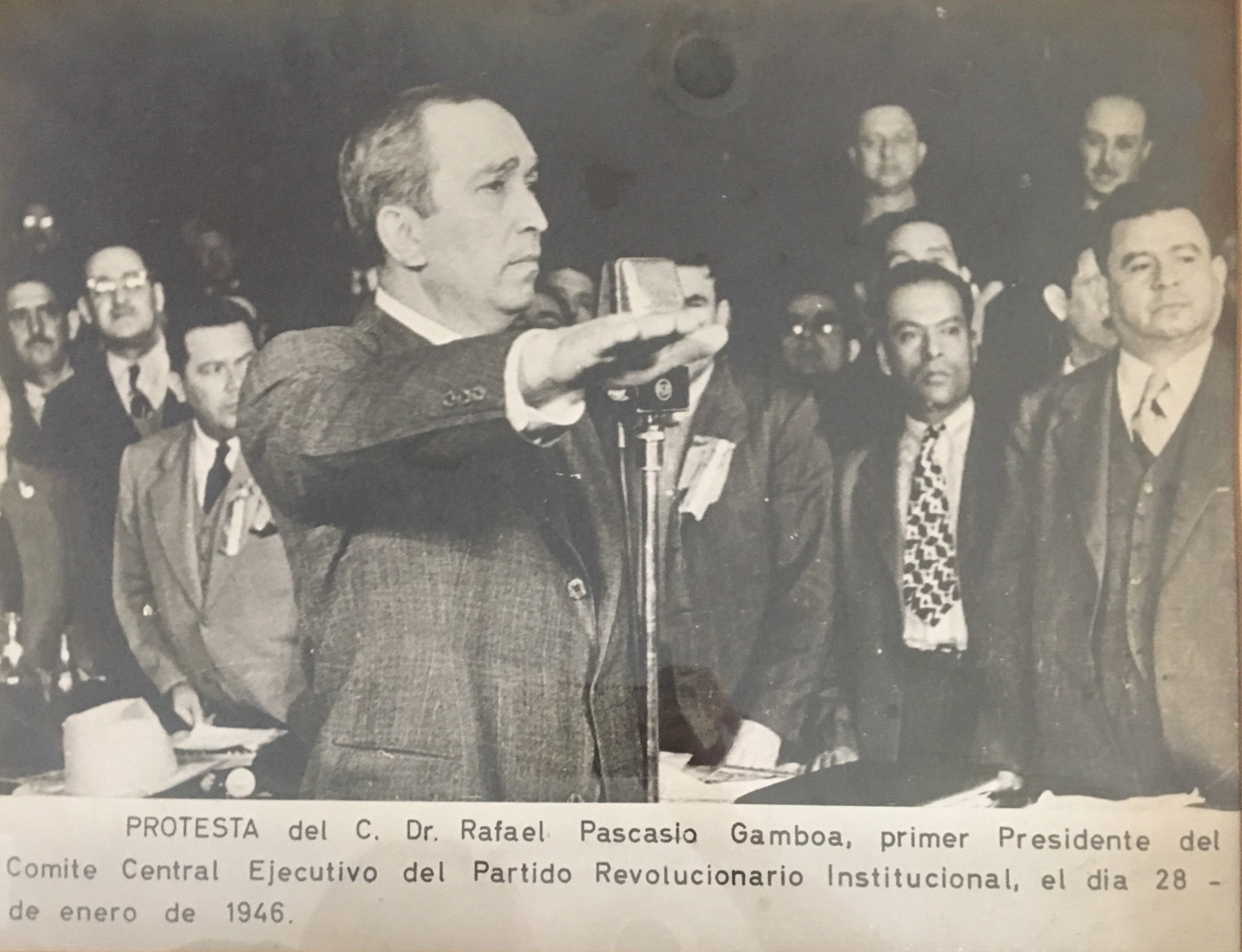 Fotografía de collage, toma de protesta de Rafael Pascasio Gamboa como Presidente del PRI